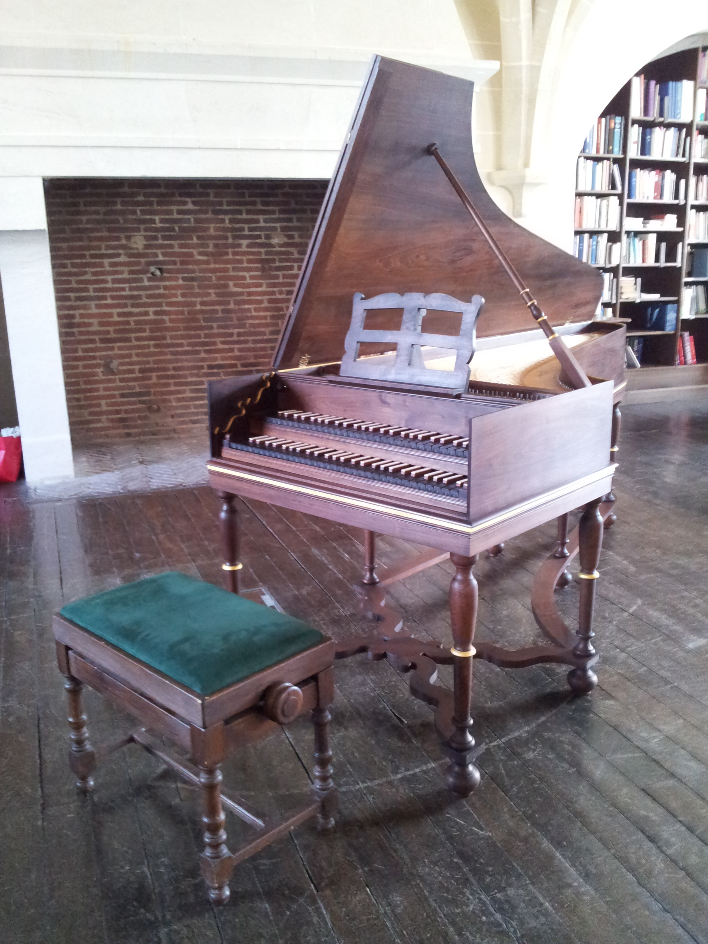 Harpsichord, made by Guillaume Rebinguet-Sudre (2)